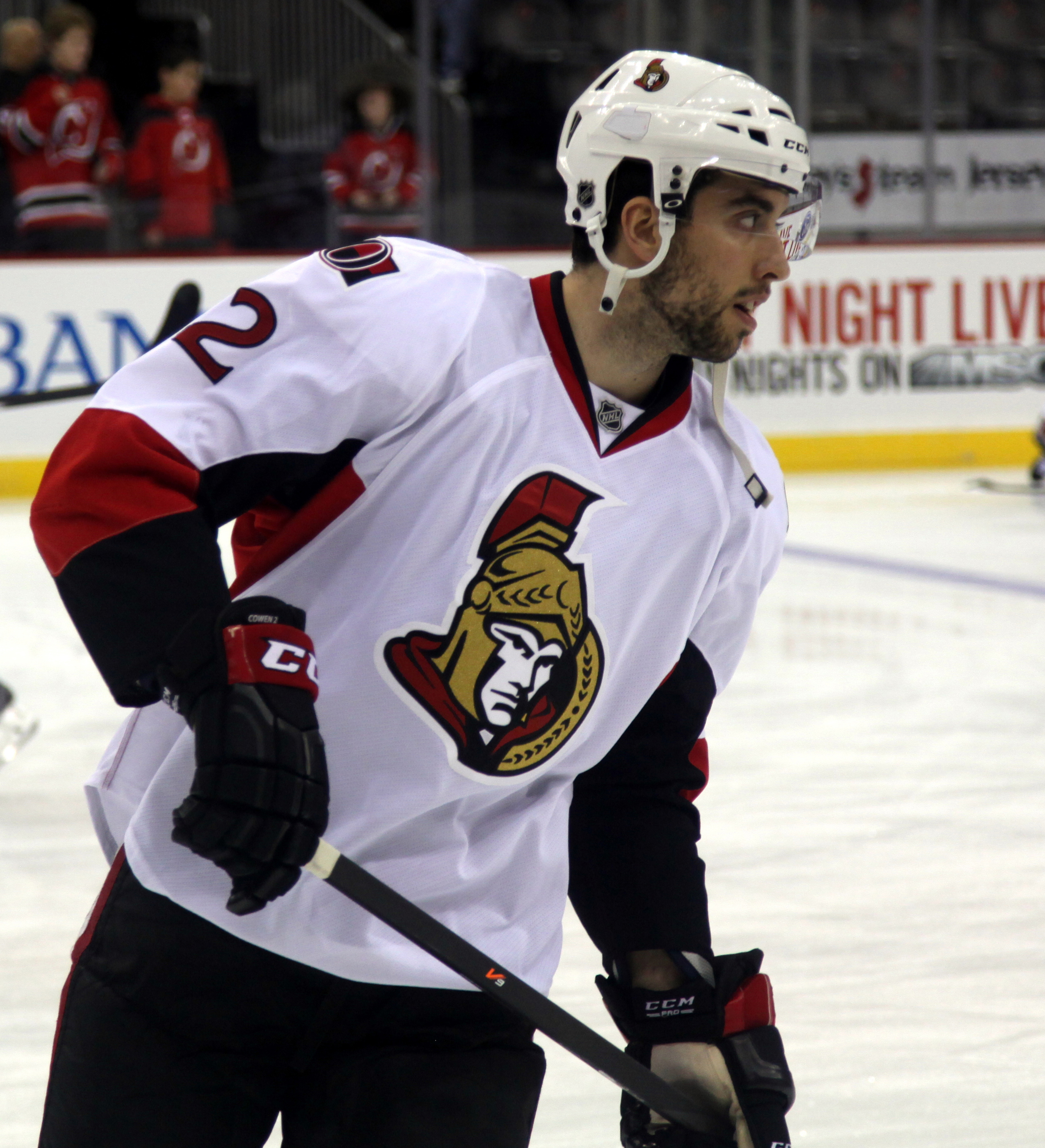 Cowen in December 2013.